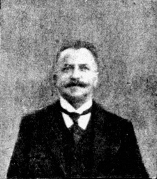 Inhaber der Farben-Groß- und Kleinhandlung Ferd. Kayser, Fabrikant der Firma Kayser Co